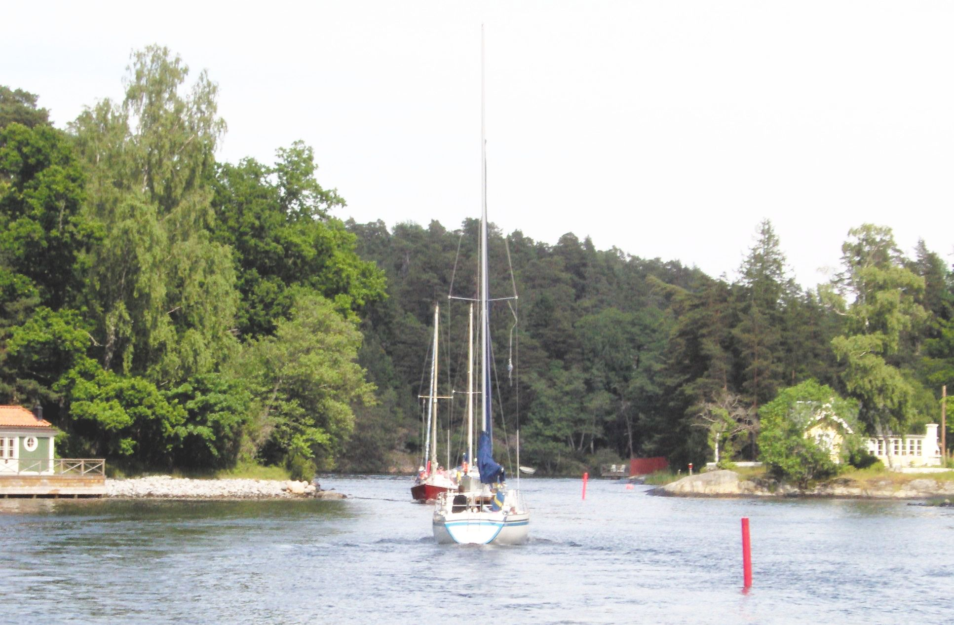 Inloppet till Baggenstäket utanför Stockholm 2005 The inlett to Baggenstäket, a narrow straiht jsut a fem miles from Stockholm. The russians were defited here in ancient times.